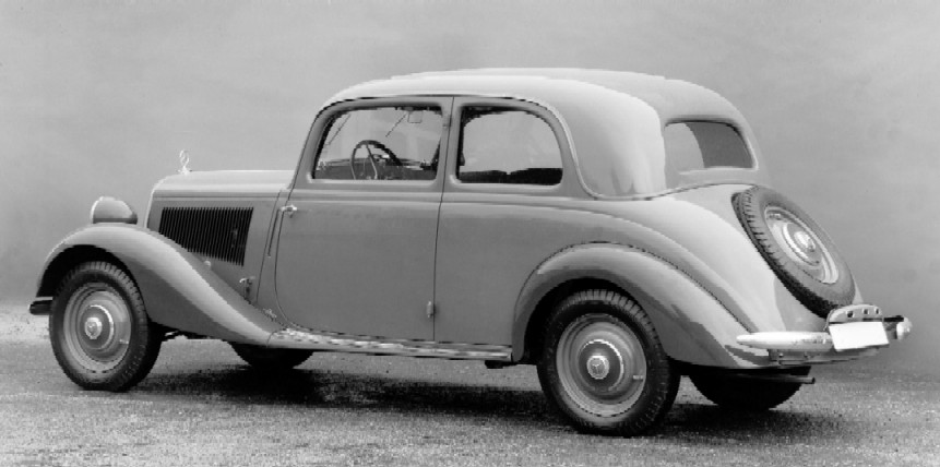 Bildbeschreibung: Typ 170 V, zweitürige Limousine, 1937-1942 Quelle: Mediaseite der DaimlerChryslerAG Genehmigung: Gern können Sie für Ihre Tätigkeit für die Wikipedia Inhalte der DaimlerChrysler Medienseiten verwenden. Dazu erkennen wir die Bedingungen nach GNU-FDL an. Das Angebot bezieht sich auch auf die vorhandenen Bilder.(Dr.Josef Ernst, Communications, DaimlerChrysler AG)